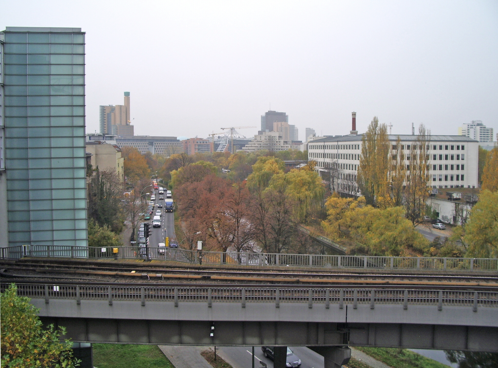 Die Straße Schöneberger Ufer und der Landwehrkanal in Berlin im November 2008